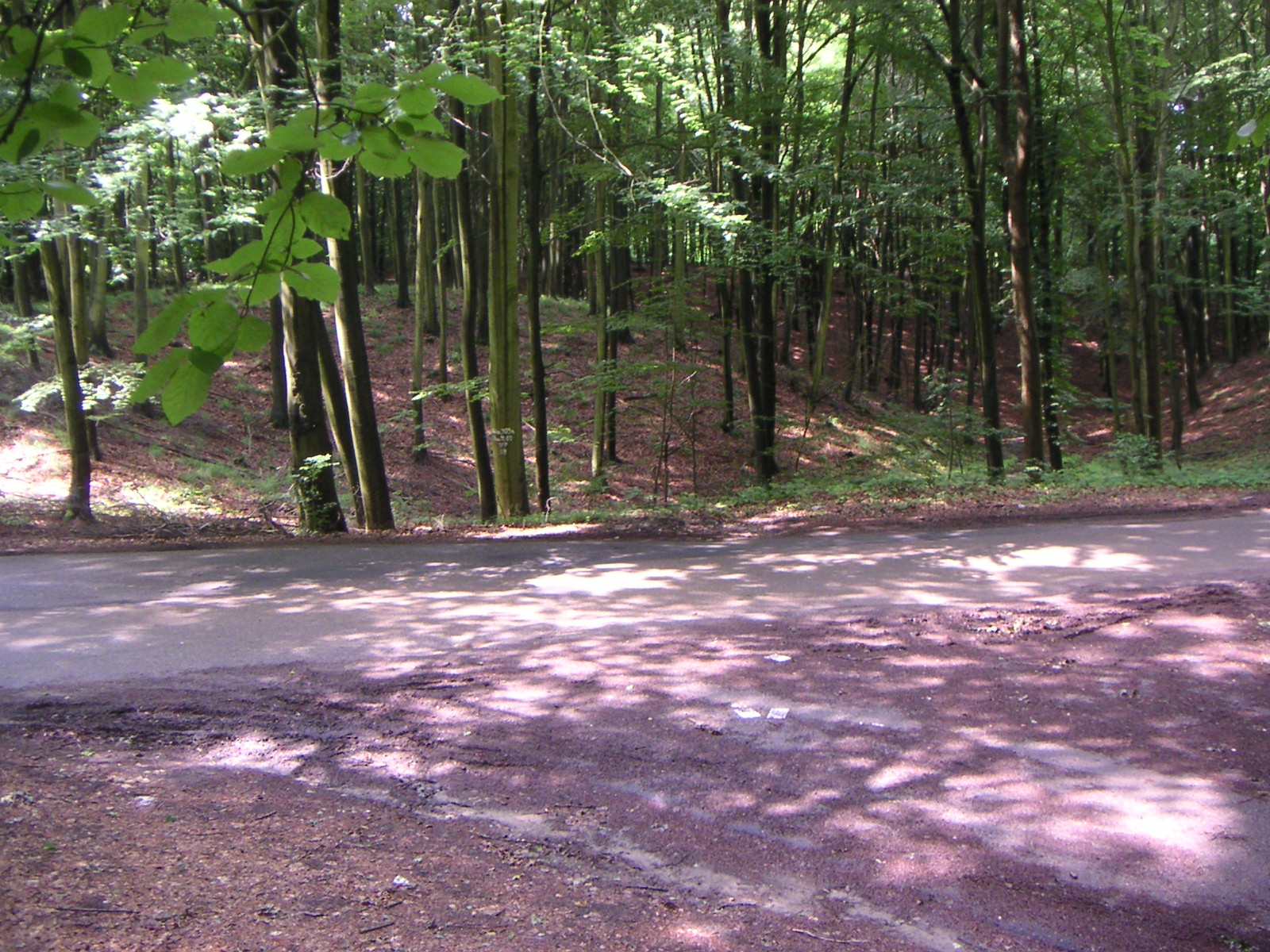 Szczeciński Park Krajobrazowy "Puszcza Bukowa", Przełęcz Bukowa, początek Drogi Dolinnej, widok na Drogę Kołowską od strony północnej